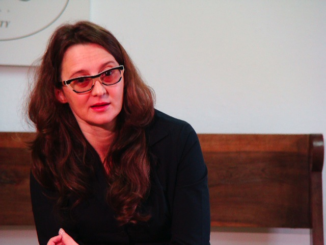 Lucrecia Martel durante coletiva de imprensa na Festa Literária Internacional de Parati, Rio de Janeiro.